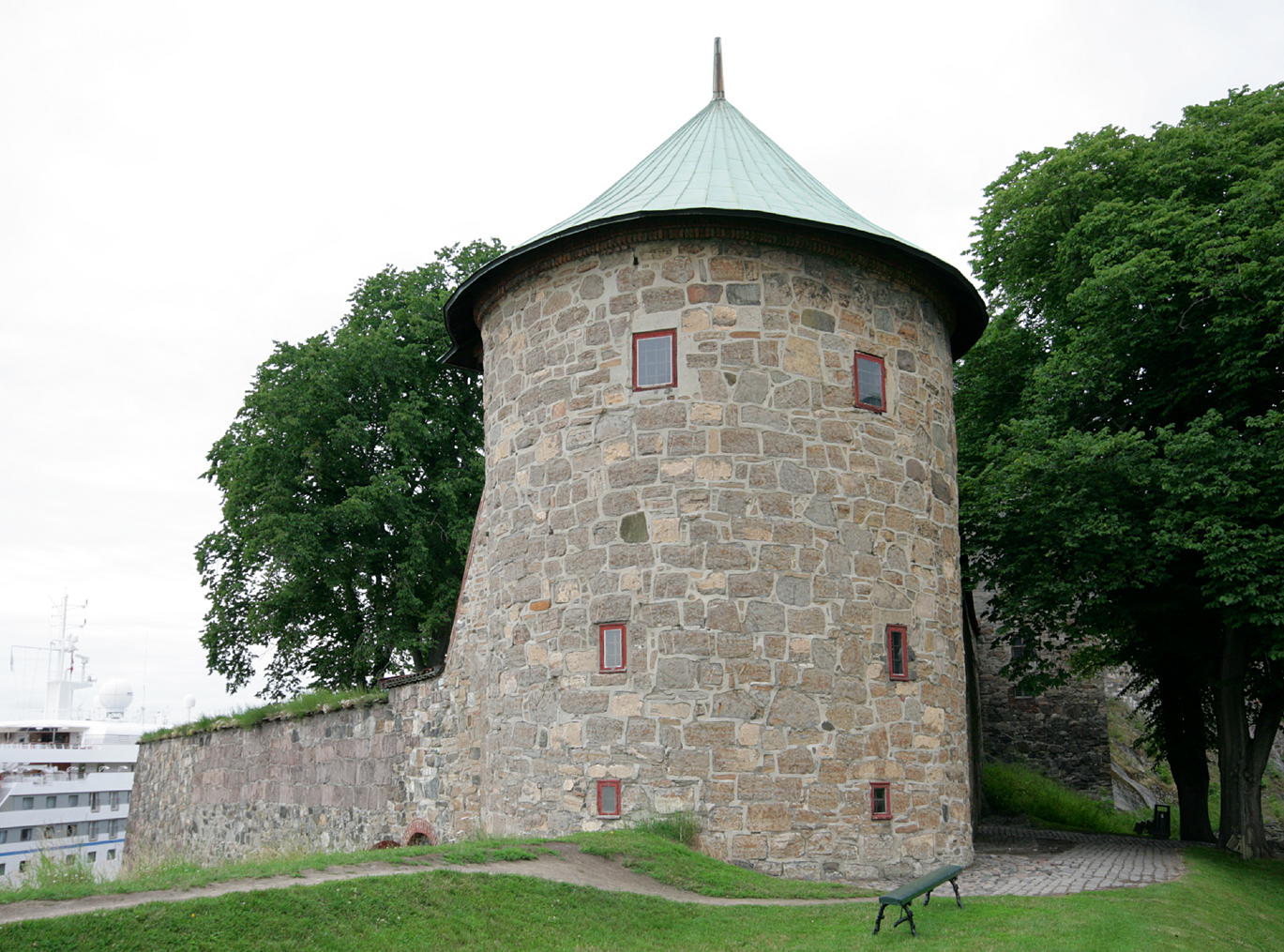 Munks tårn Akershus festning, Oslo. Bygd 1559 av lensherre Christiern Munk.